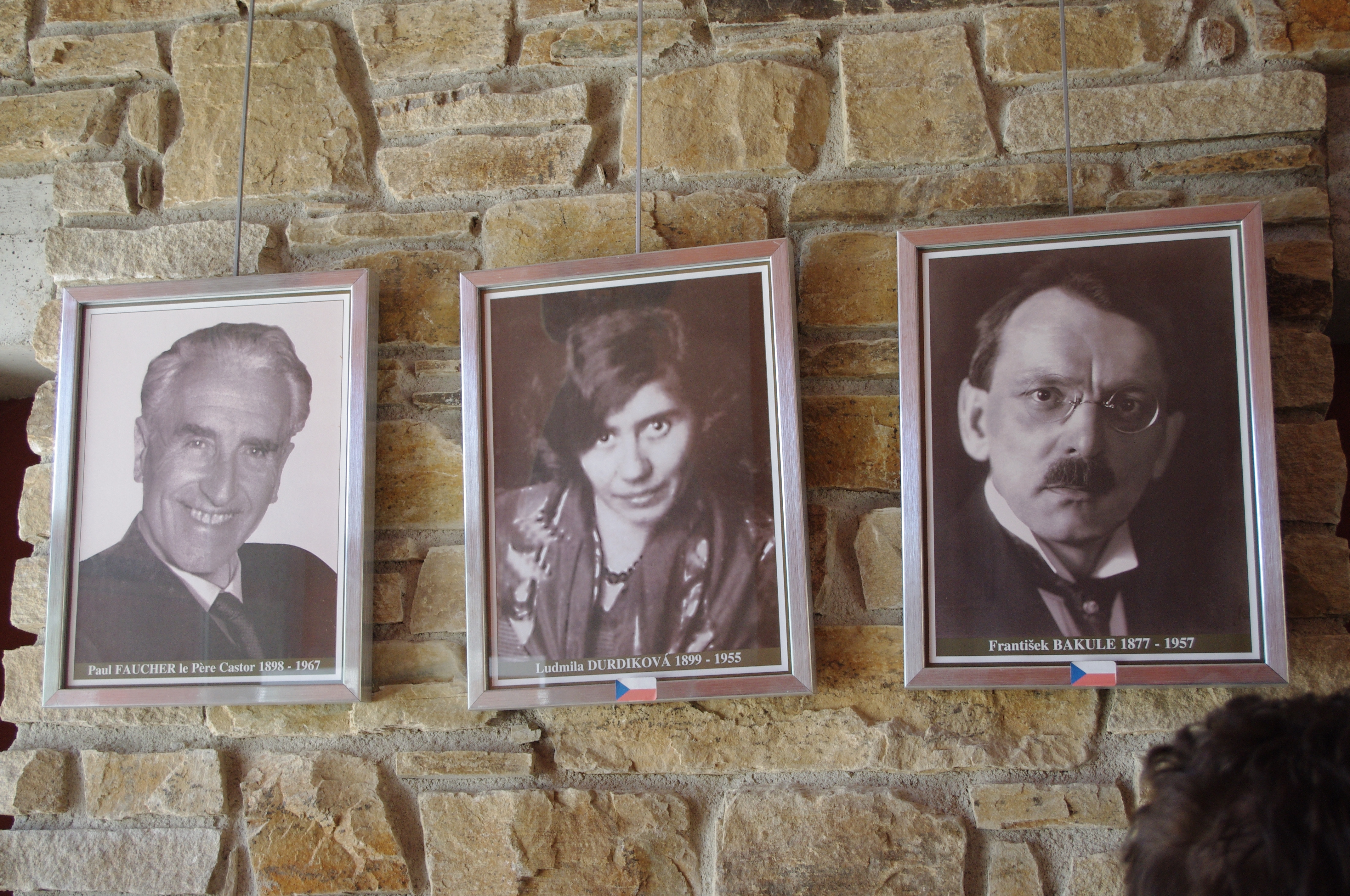 de gauche à droite : Paul Faucher, Lida Faucher, František Bakule